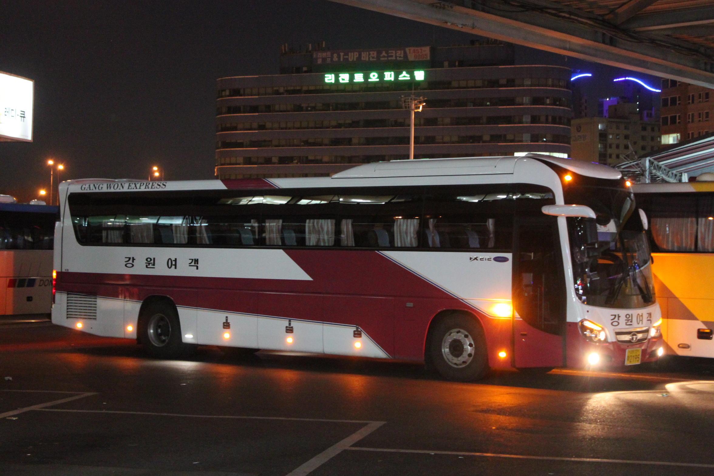 강원여객 소속 FX212 슈퍼스타